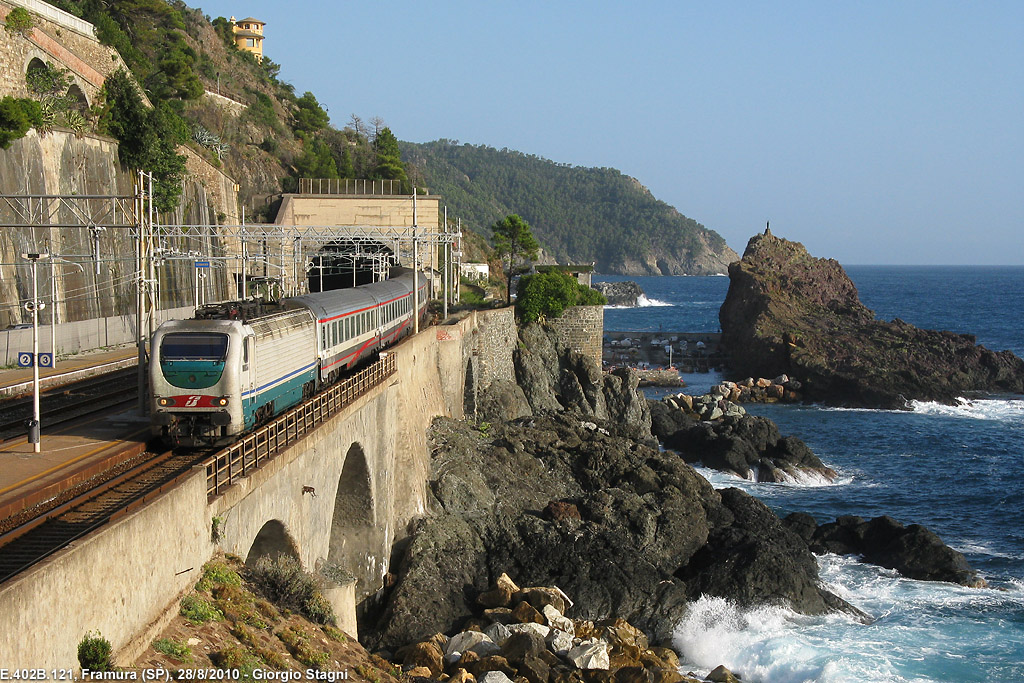 Stazione ferroviaria di Framura. È in transito un treno trainato dalla locomotiva elettrica E.402.121.